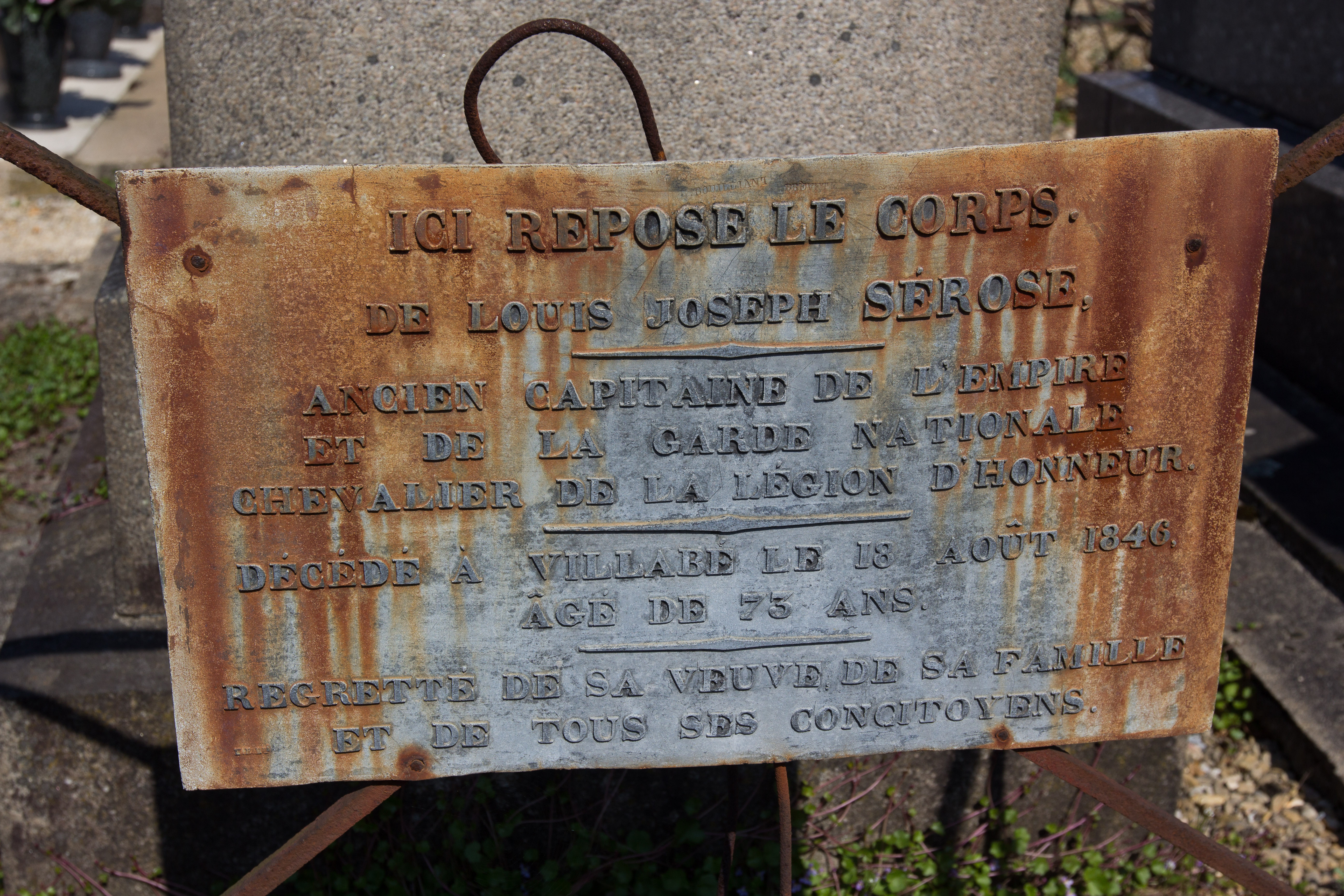 Cimetière de Villabé / Villabé / Essonne / France